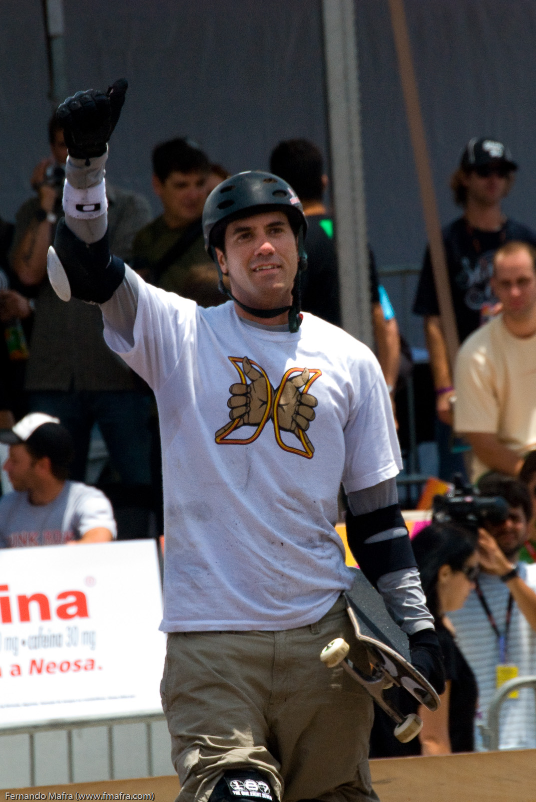 Bob Burnquist, 2008